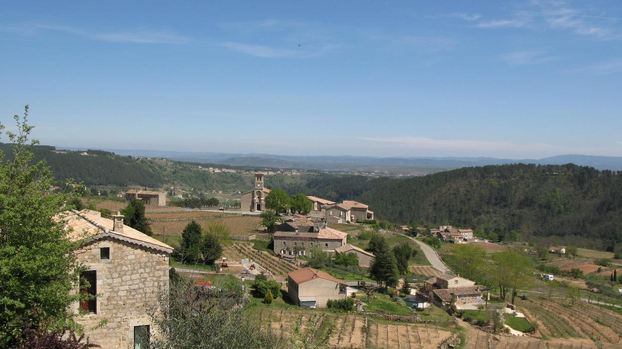 Village de Ribes (Ardèche)